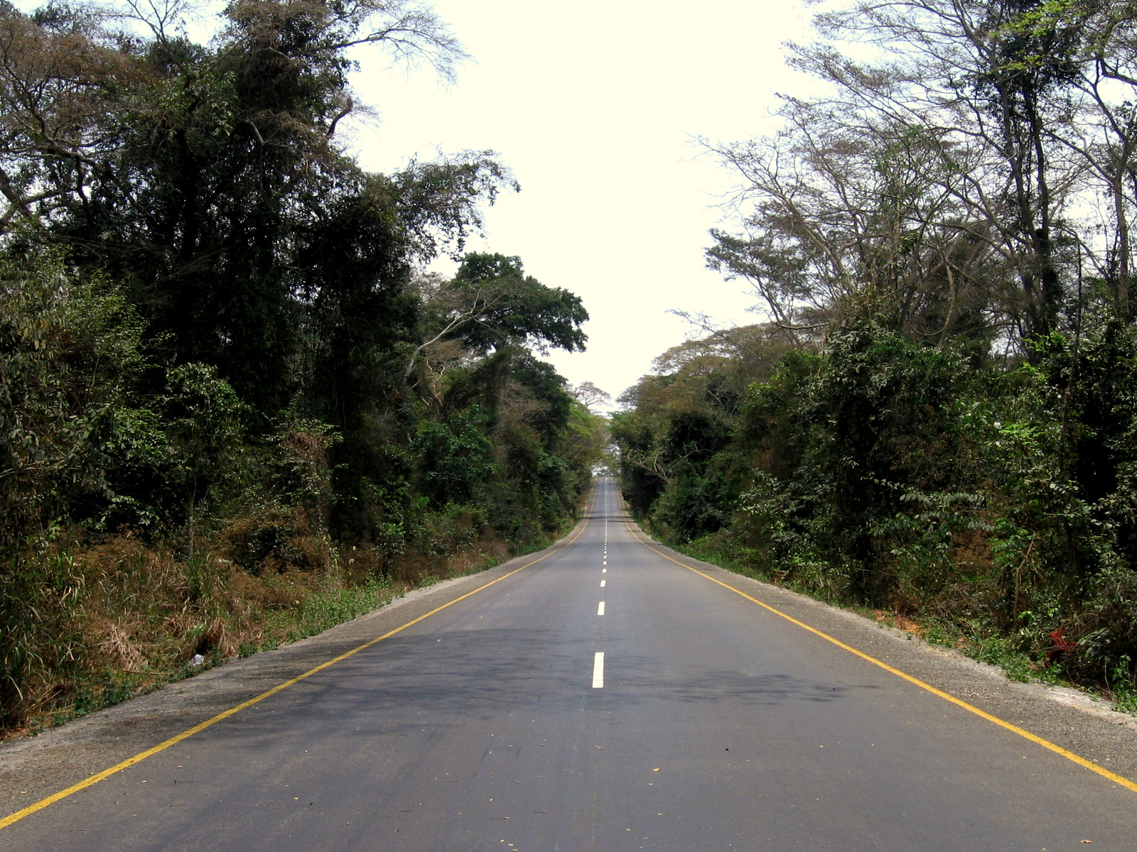 Luanda-Uíge Road